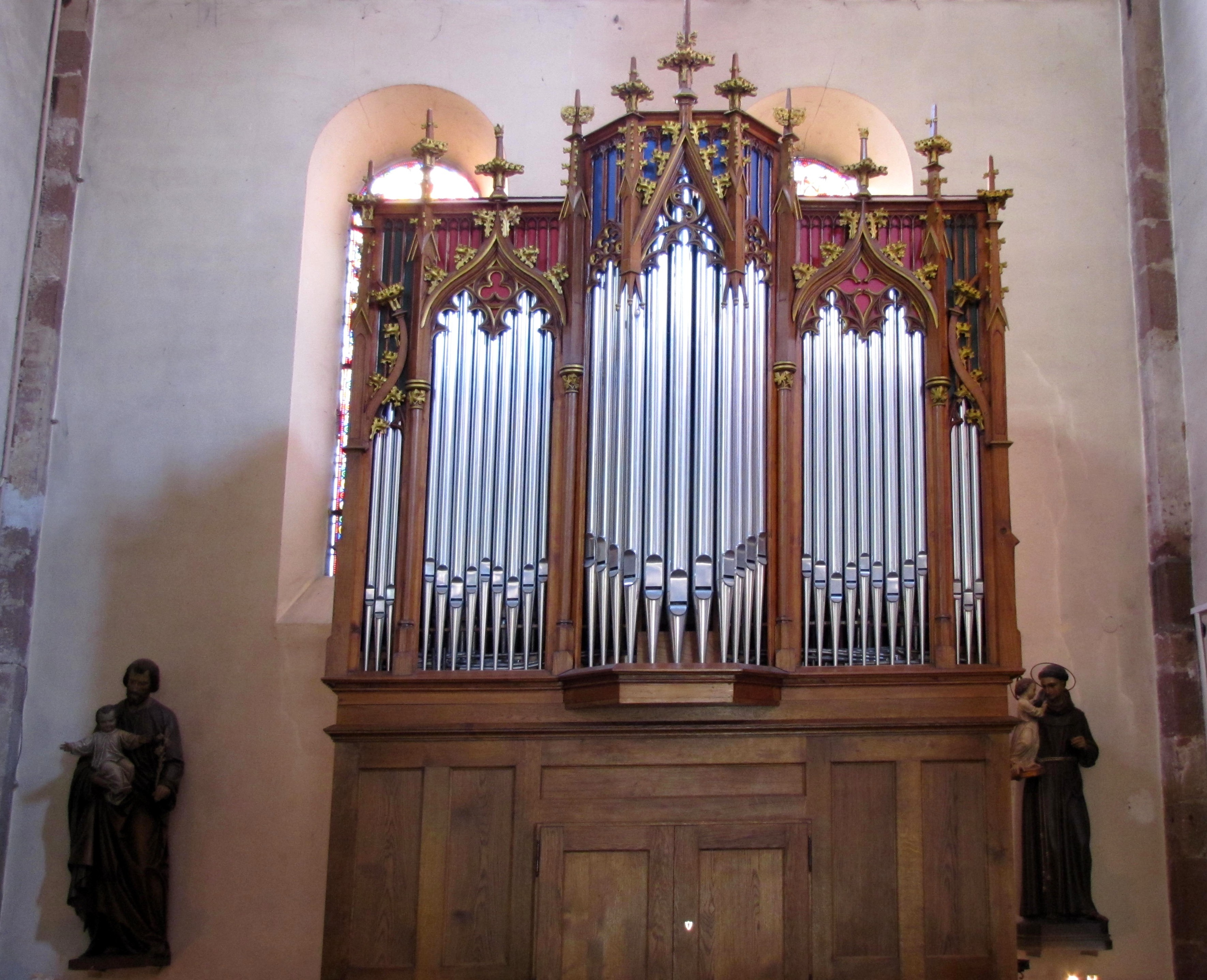 Alsace, Bas-Rhin, Sélestat, Église Sainte-Foy (PA00084981, IA00124586). Orgue de chœur Matthaeus Moessmer-Dott (1880)